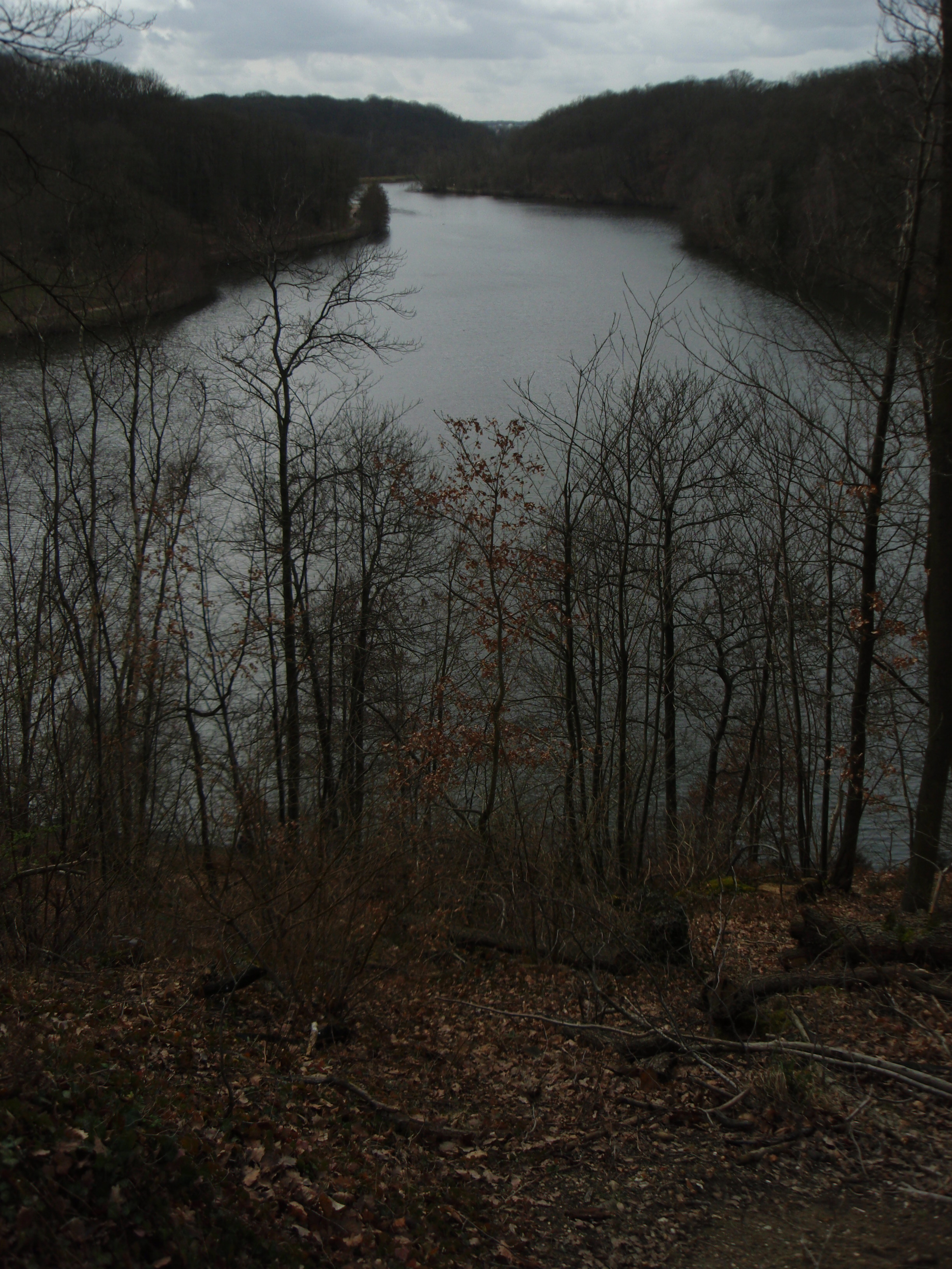 Etangs de La Minière vus depuis plateau Satory (Ravin de Bouviers)